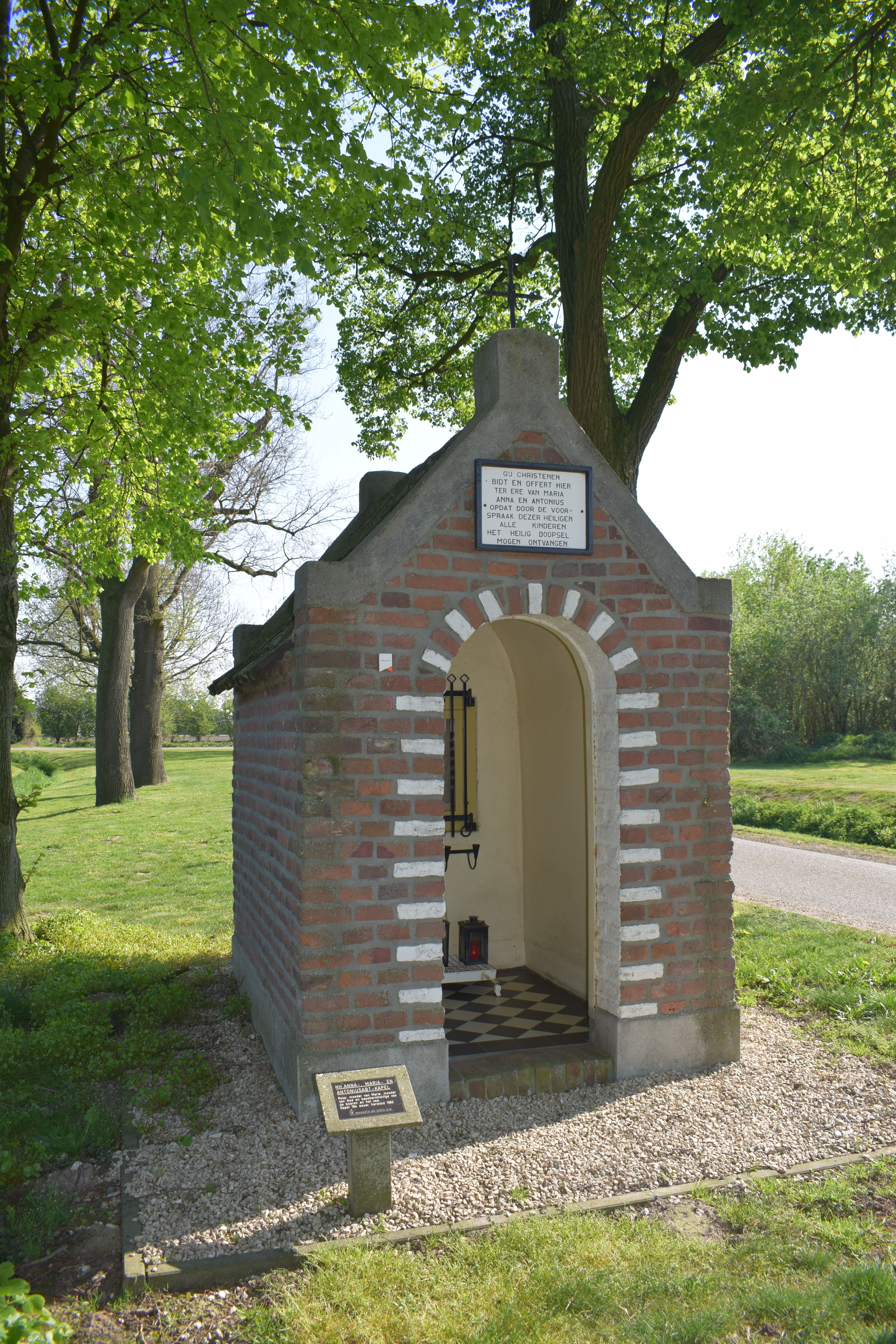 Veldkapel, Scheiweg (Leunen)